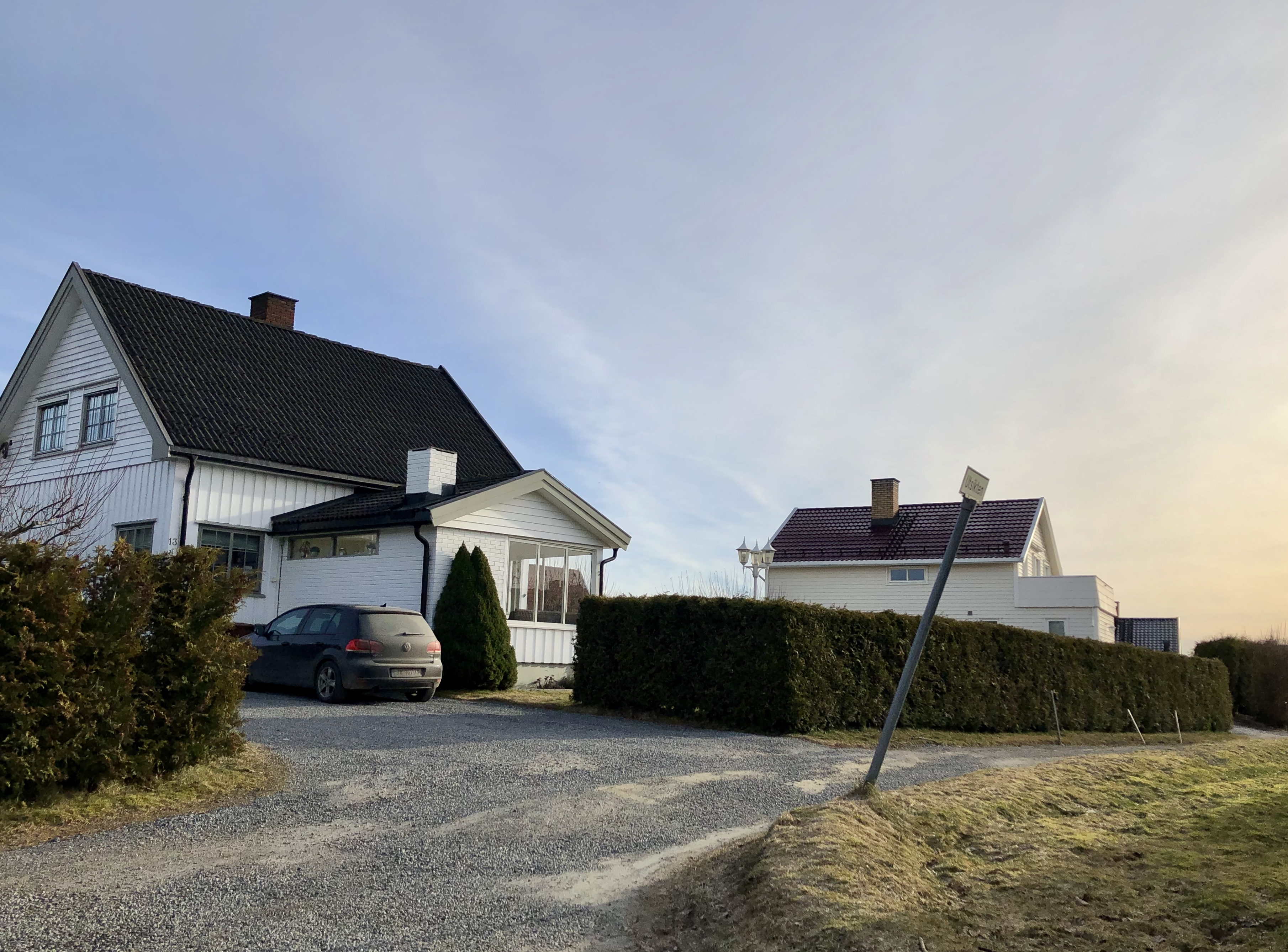 Utsikten, Hønefoss (Lageshallveien 13 og Utsikten 4)